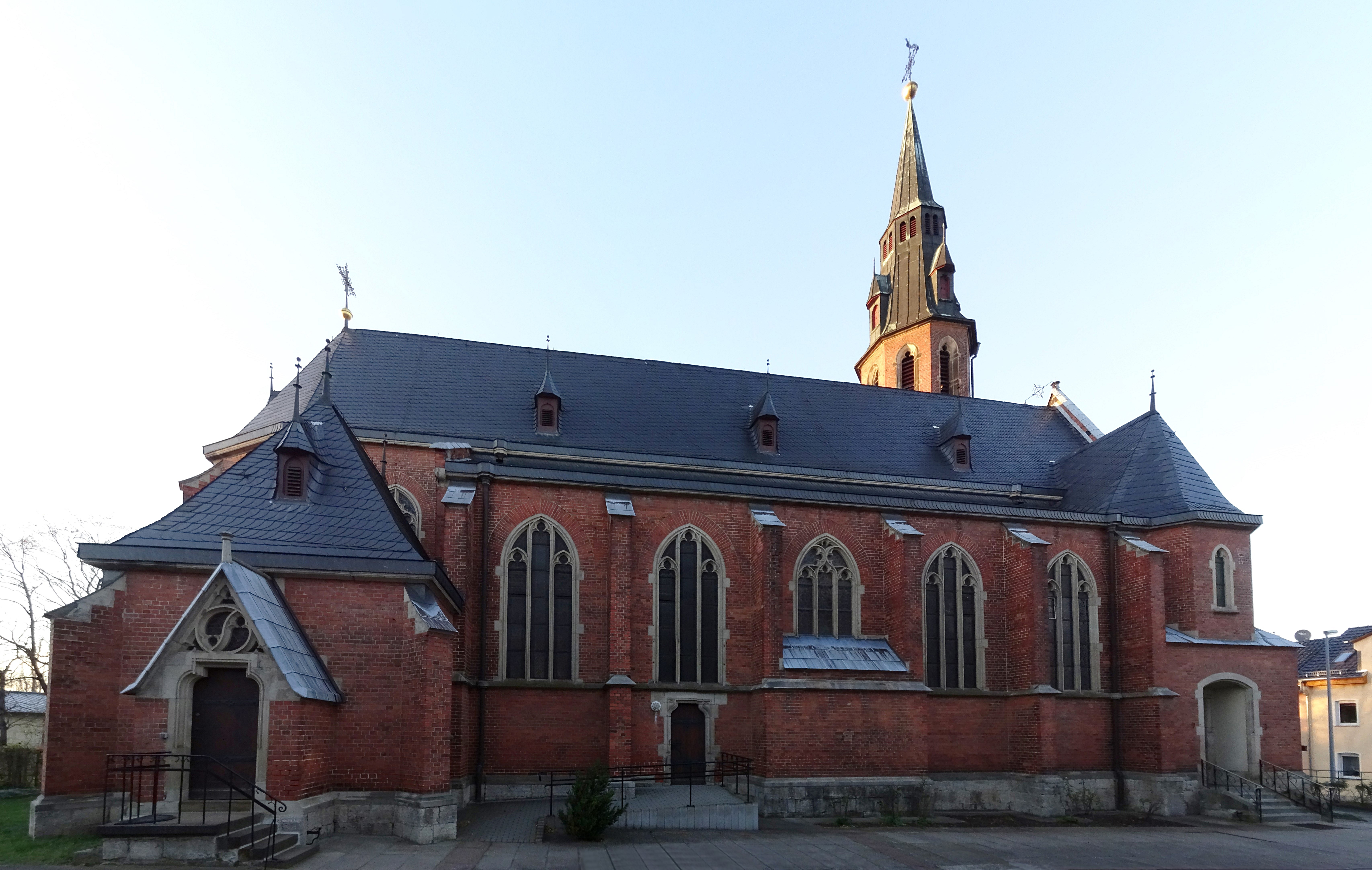 Pfarrkirche St. Bonifatius Apolda